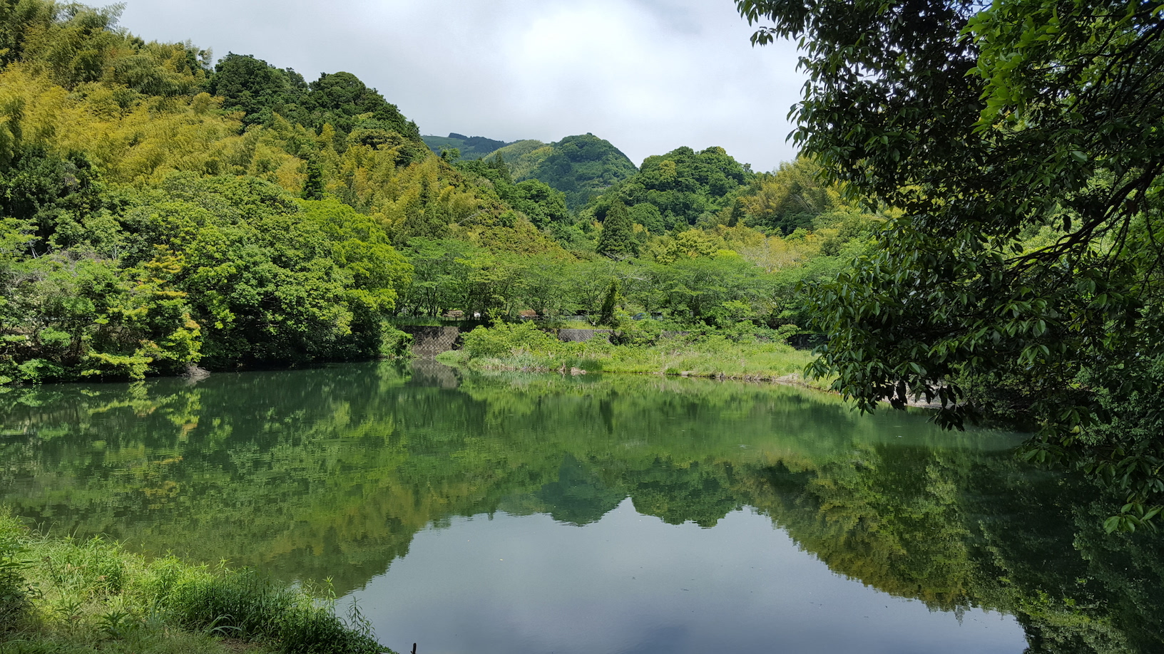 山原堤（やんばらづつみ）